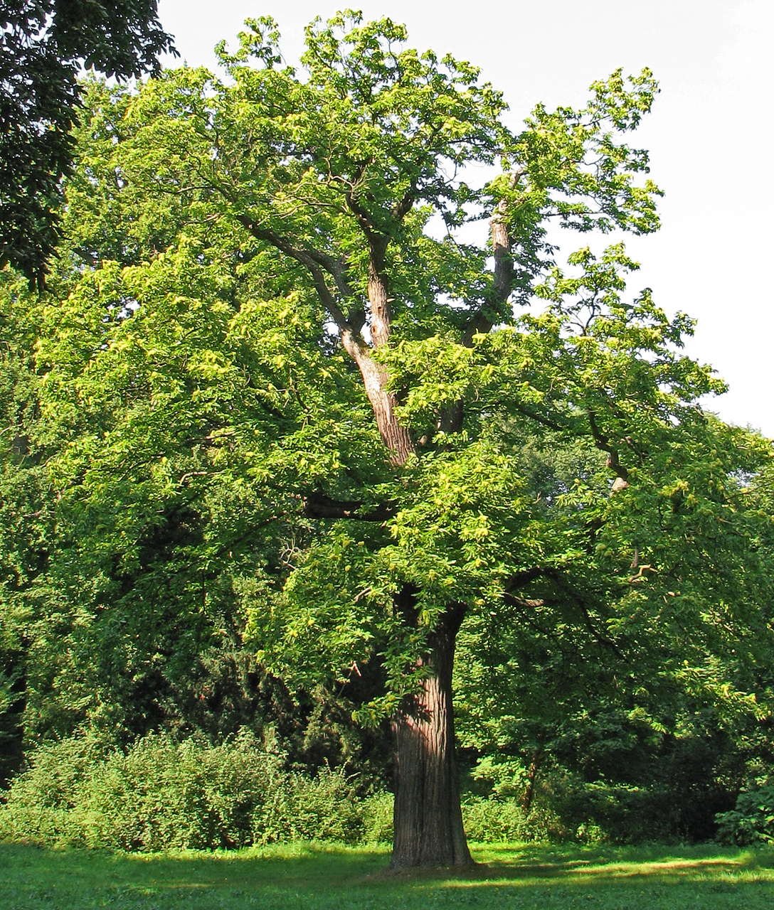 Beschreibung: Edelkastanie (Castanea sativa) Fotograf: Darkone, 5. September 2005